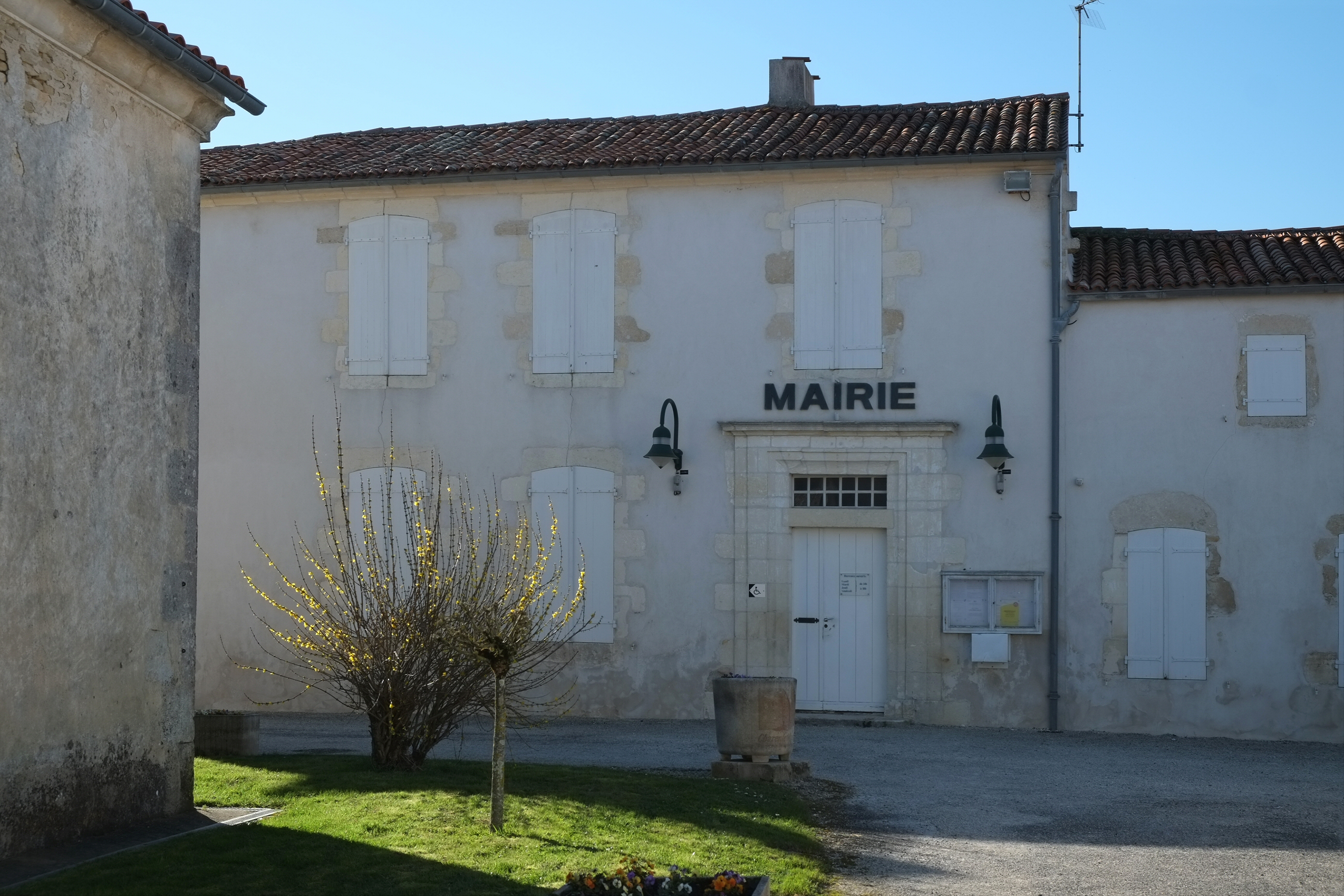 Façade de la mairie Ciré-d'Aunis Charente-Maritime France